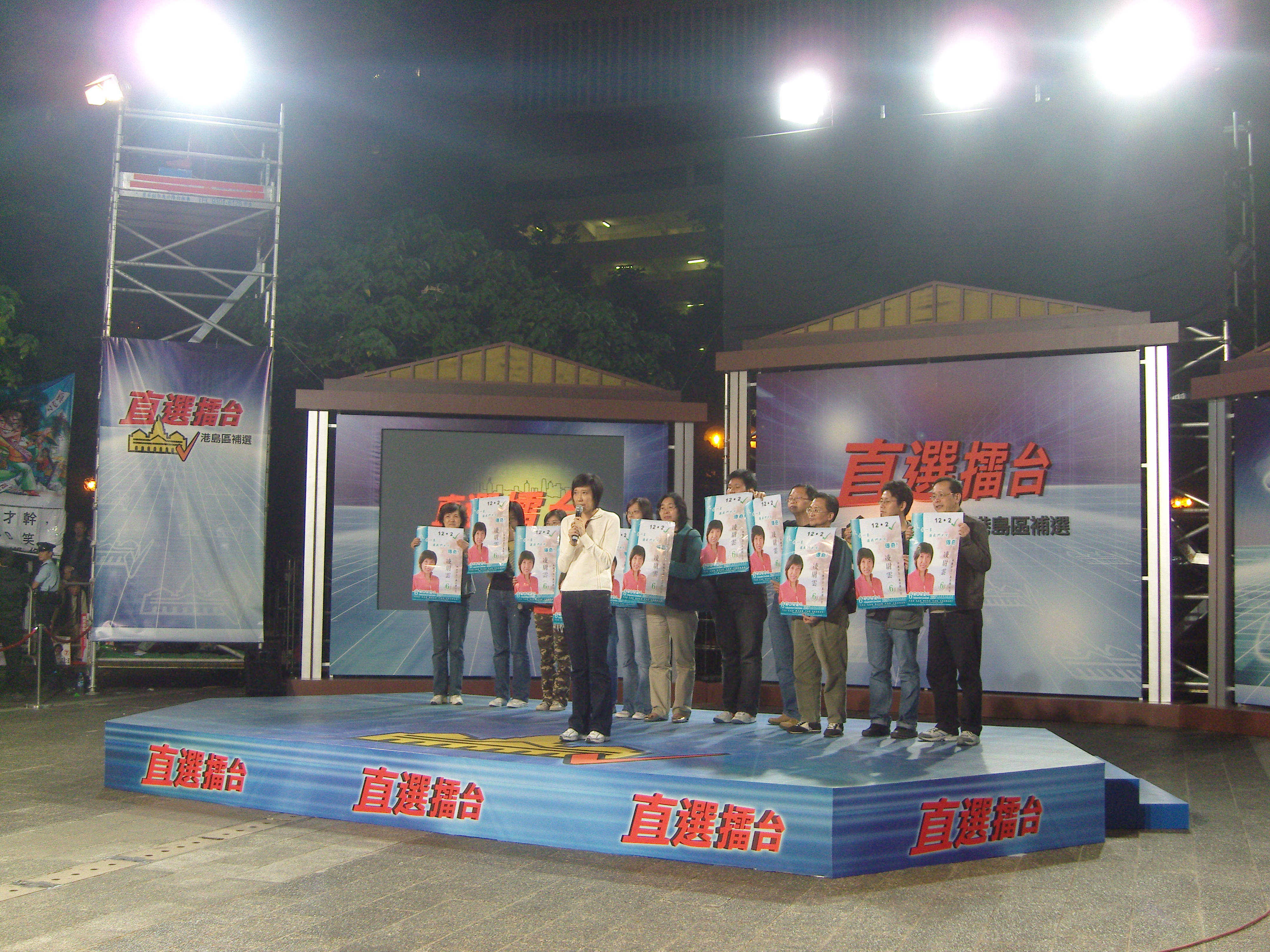 香港立法會港島區補選八大傳媒選舉論壇。